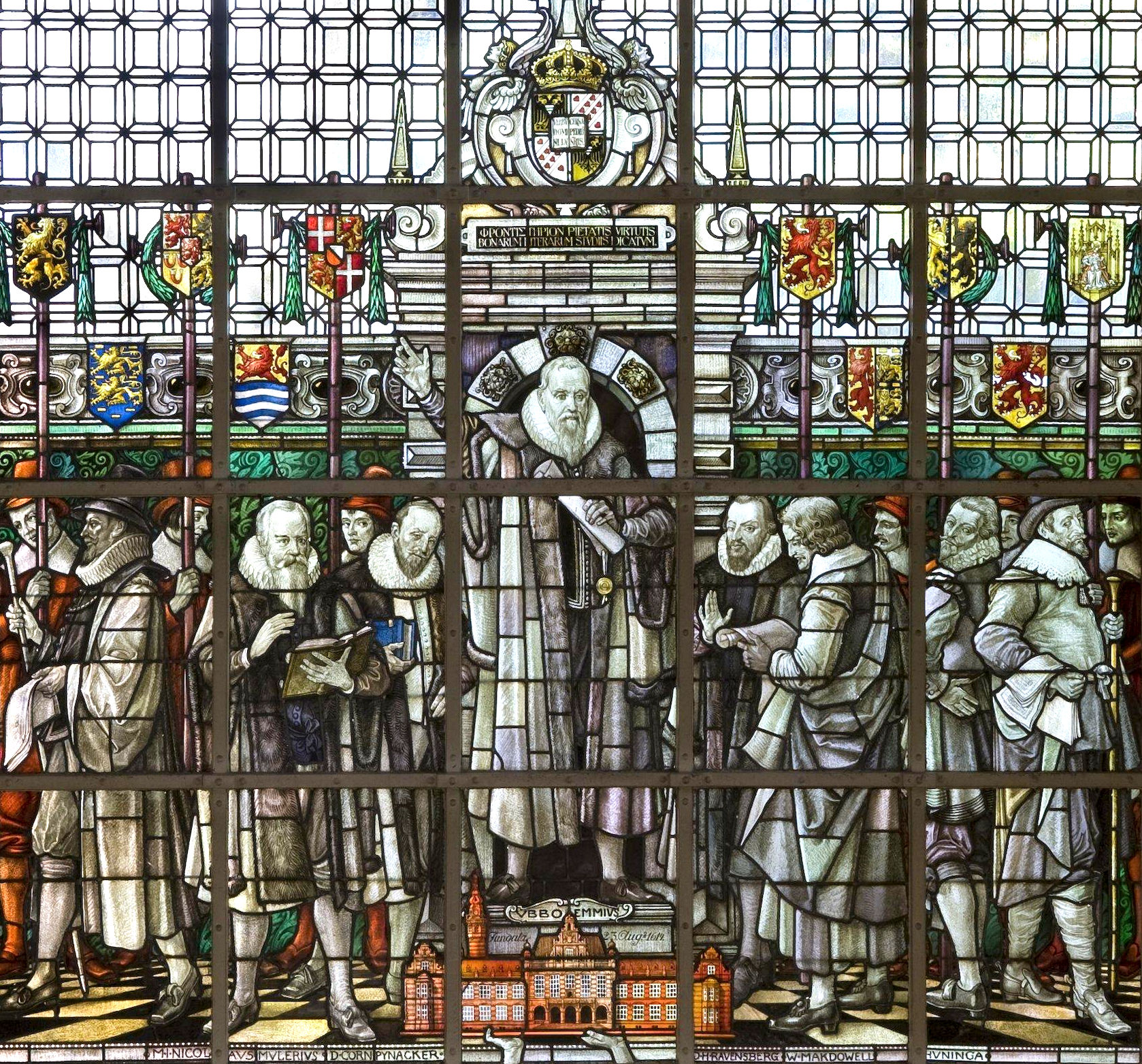 Universiteitsgebouw: Interieur. Gebrandschilderd glas in het trappenhuis van het Academiegebouw met de beeltenissen van Ubbo Emmius, Nicolaus Mulerius, Cornelis Pijnacker, Hermann Ravensberger, William Makdowell en Johan Huninga (1584-1639). Glas gemaakt door de gebroeders Otto Linnemann en Rudolf Linnemann (1909).